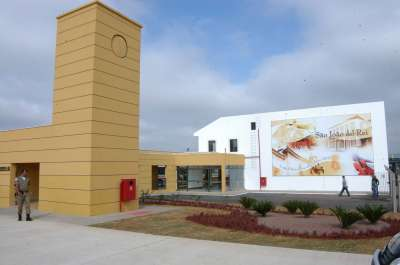 Imagem própria